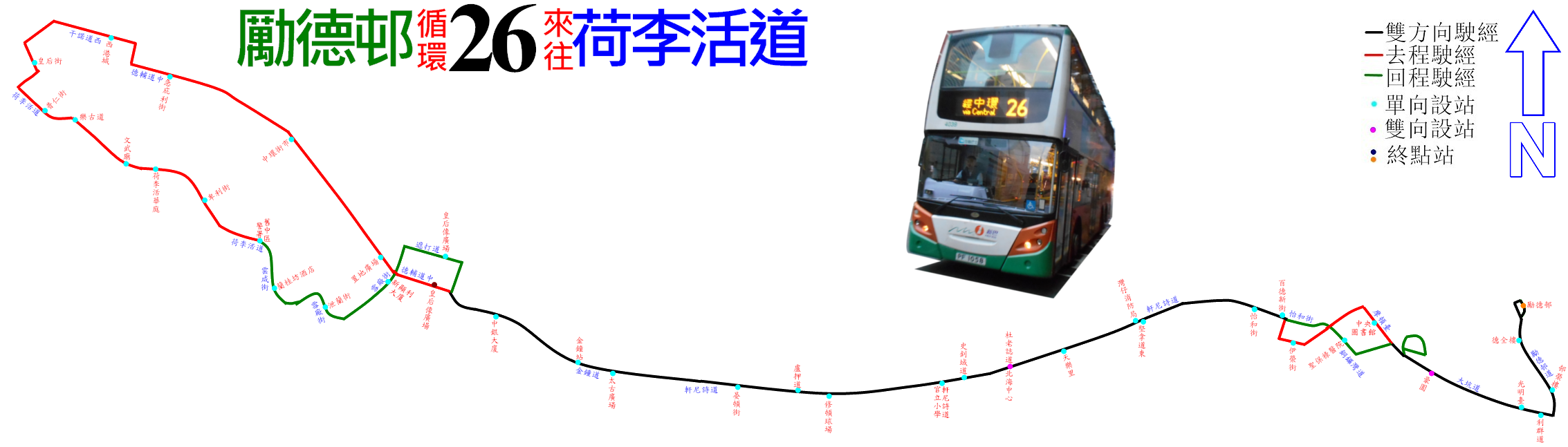 新巴26號線的走線圖